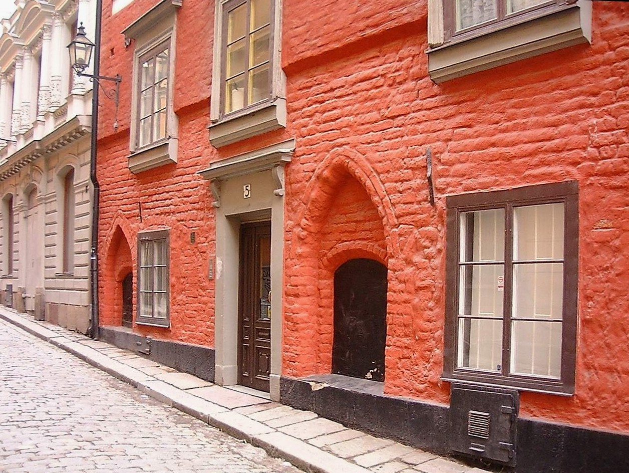 Detail of 5, Stora Gråmunkegränd. Gamla stan, Stockholm.